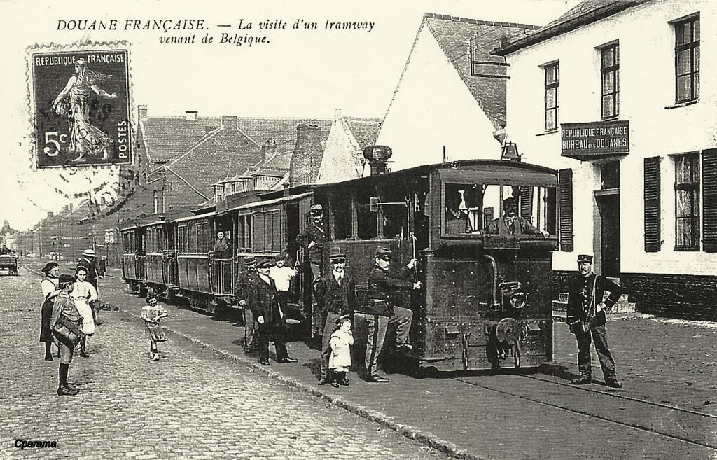 Carte postale Titre : DOUANE FRANÇAISE. - La visite d'un tramway venant de Belgique.